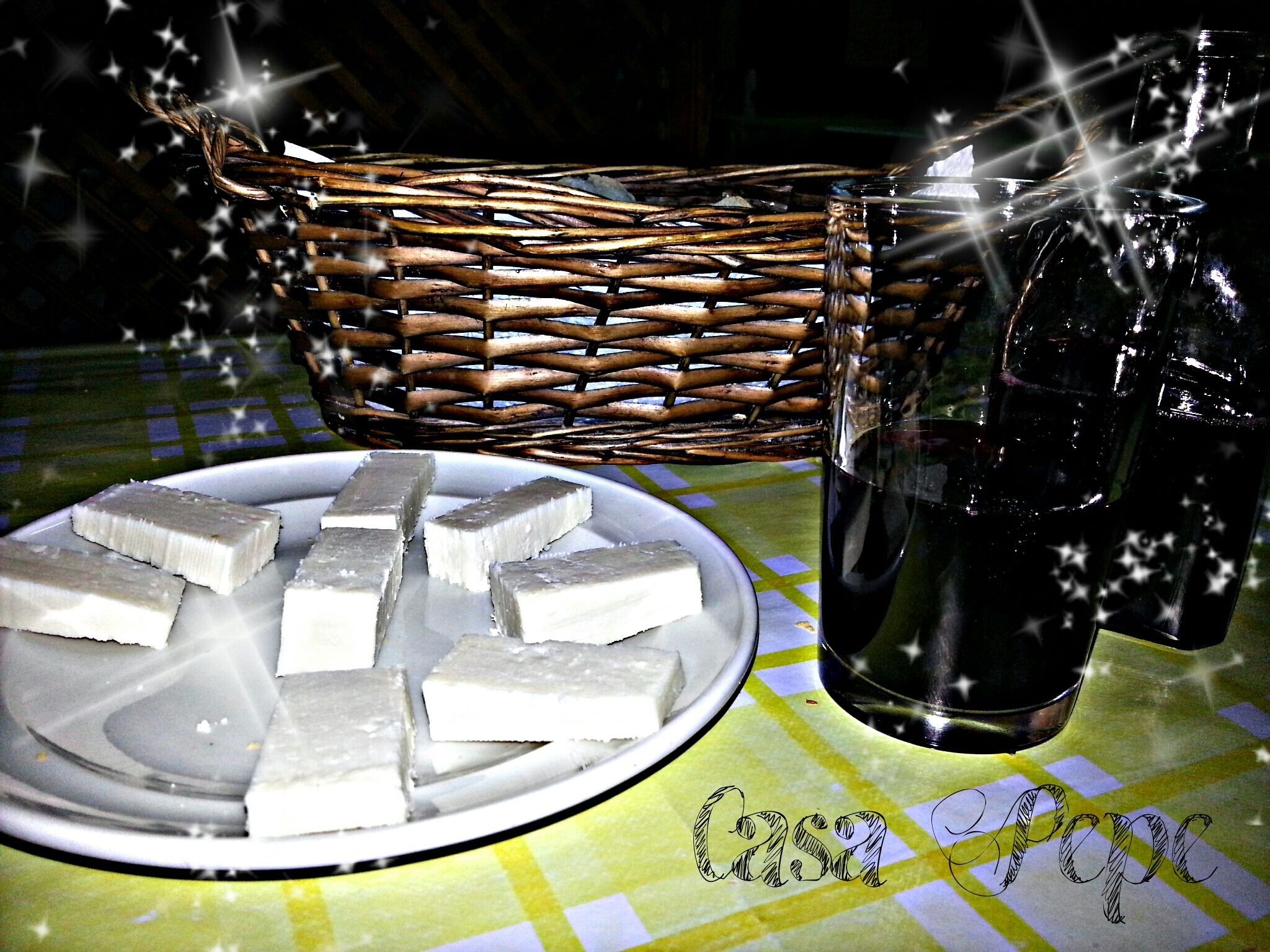 Islas Canarias Tenerife La Victoria de Acentejo Guachinche: Casa Pepe